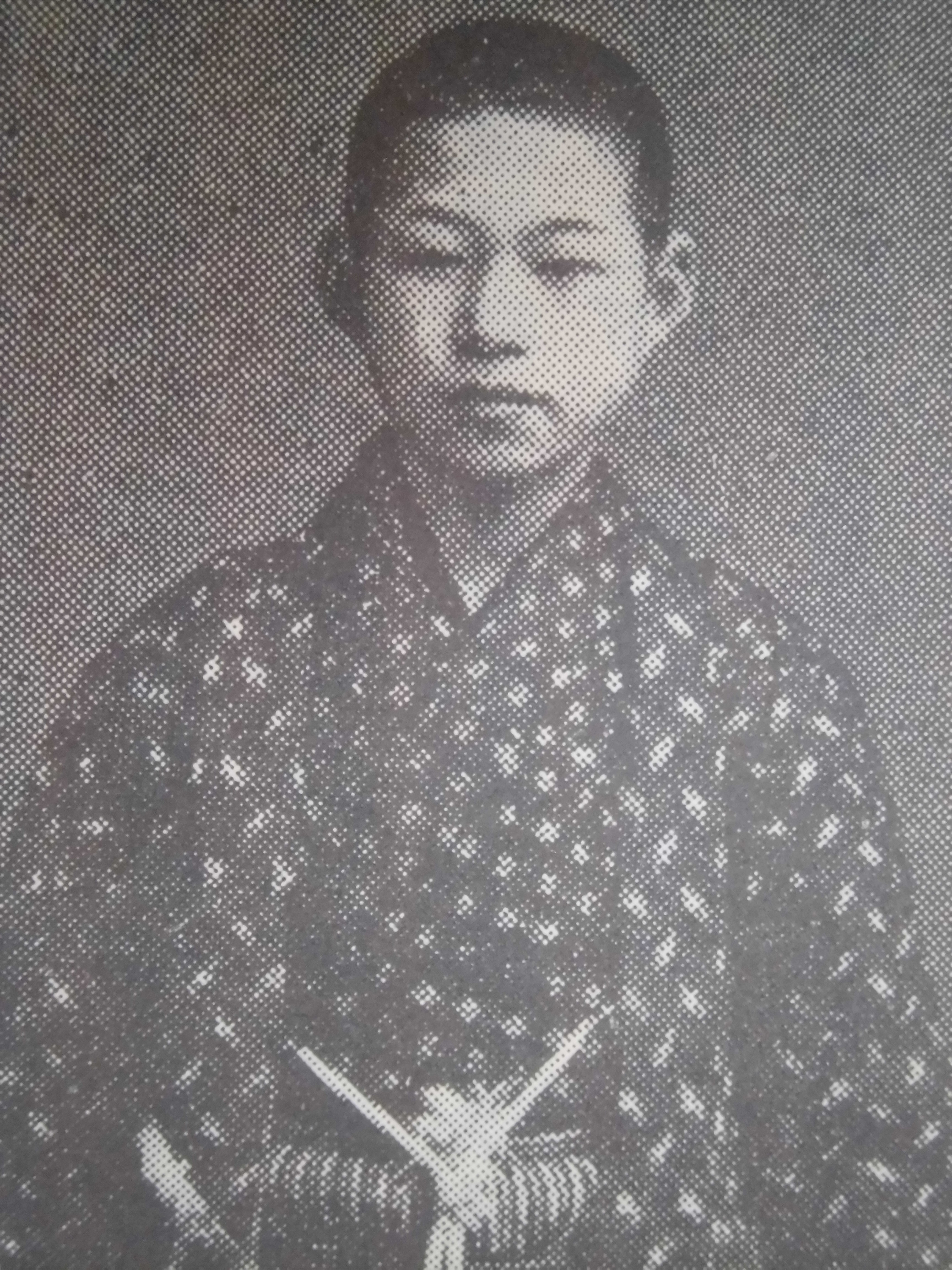 青木均一（Kinichi Aoki）